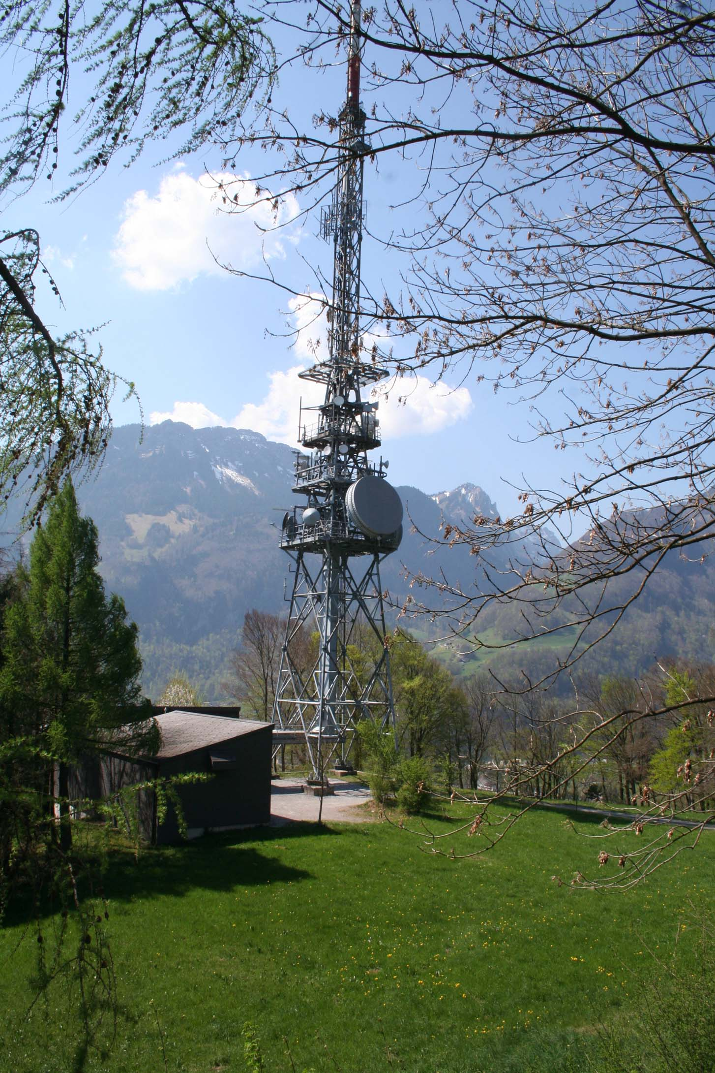 Fernsehturm auf dem Biberlichopf